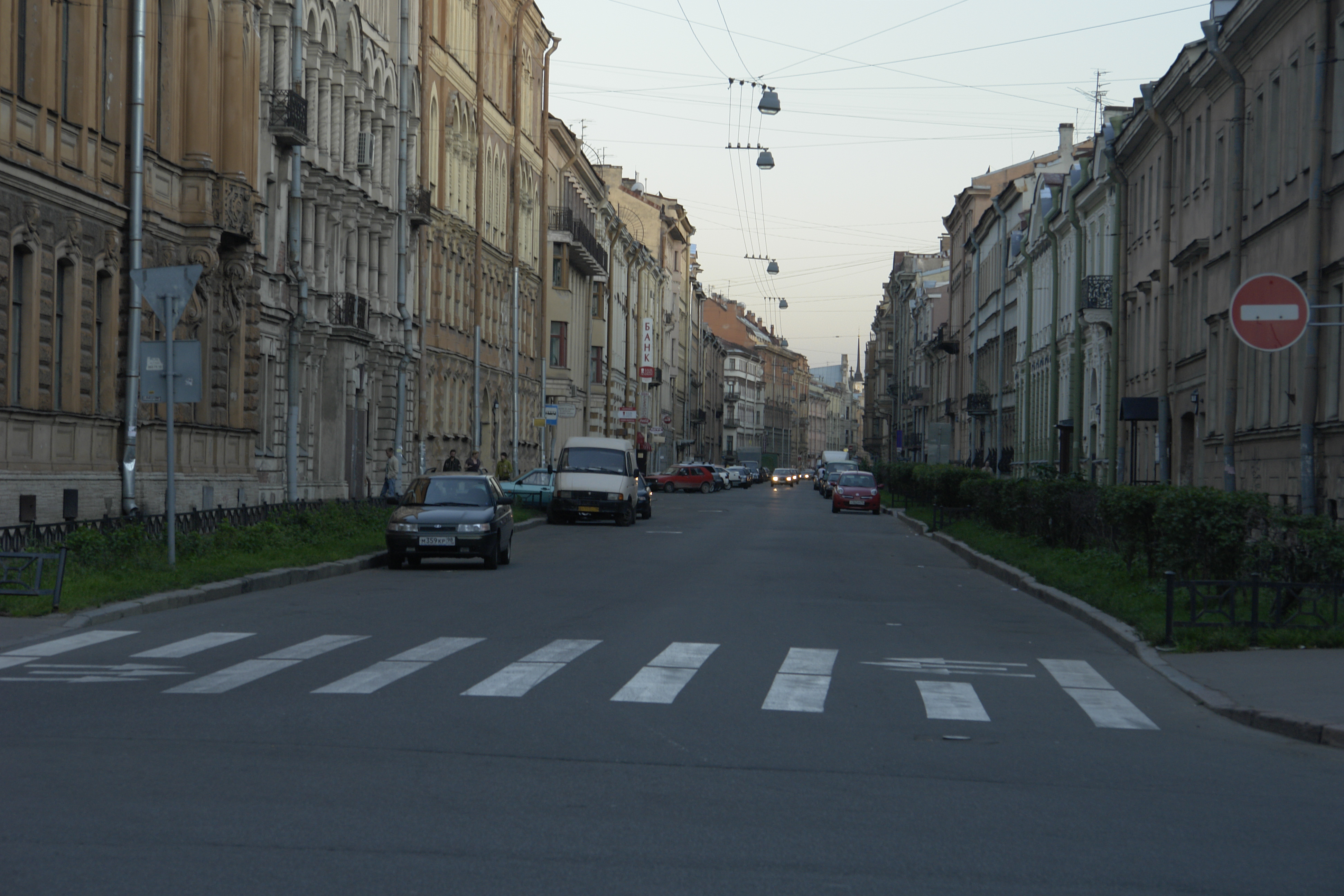 Моховая улица (вид с улицы Чайковского).